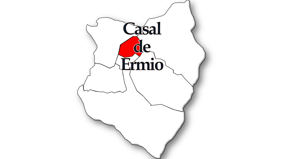 População